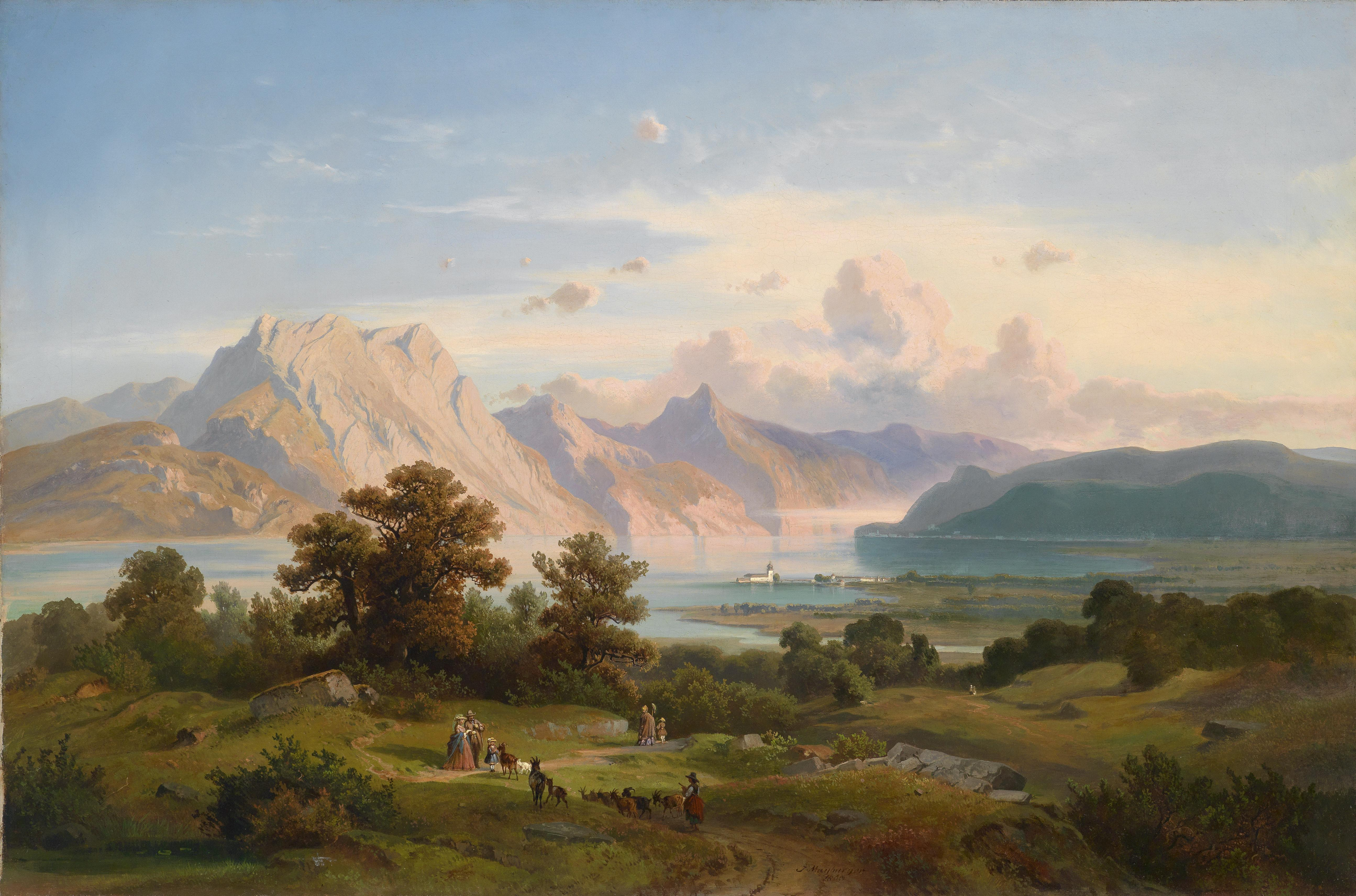 Blick auf Schloss Orth am Traunseelabel QS:Lde,"Blick auf Schloss Orth am Traunsee"